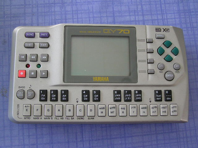 Arrangeyr Yamaha QY-70